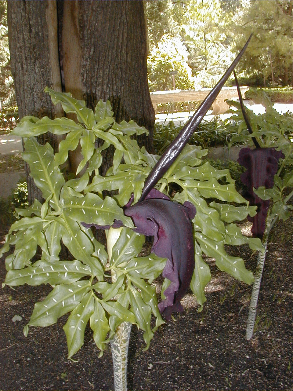 Dracunculus vulgaris. Real Jardín Botánico de Madrid.